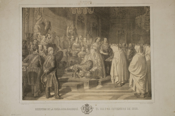 Estampa. Recepción de la Embajada Marroquí el día 6 de septiembre de 1860.